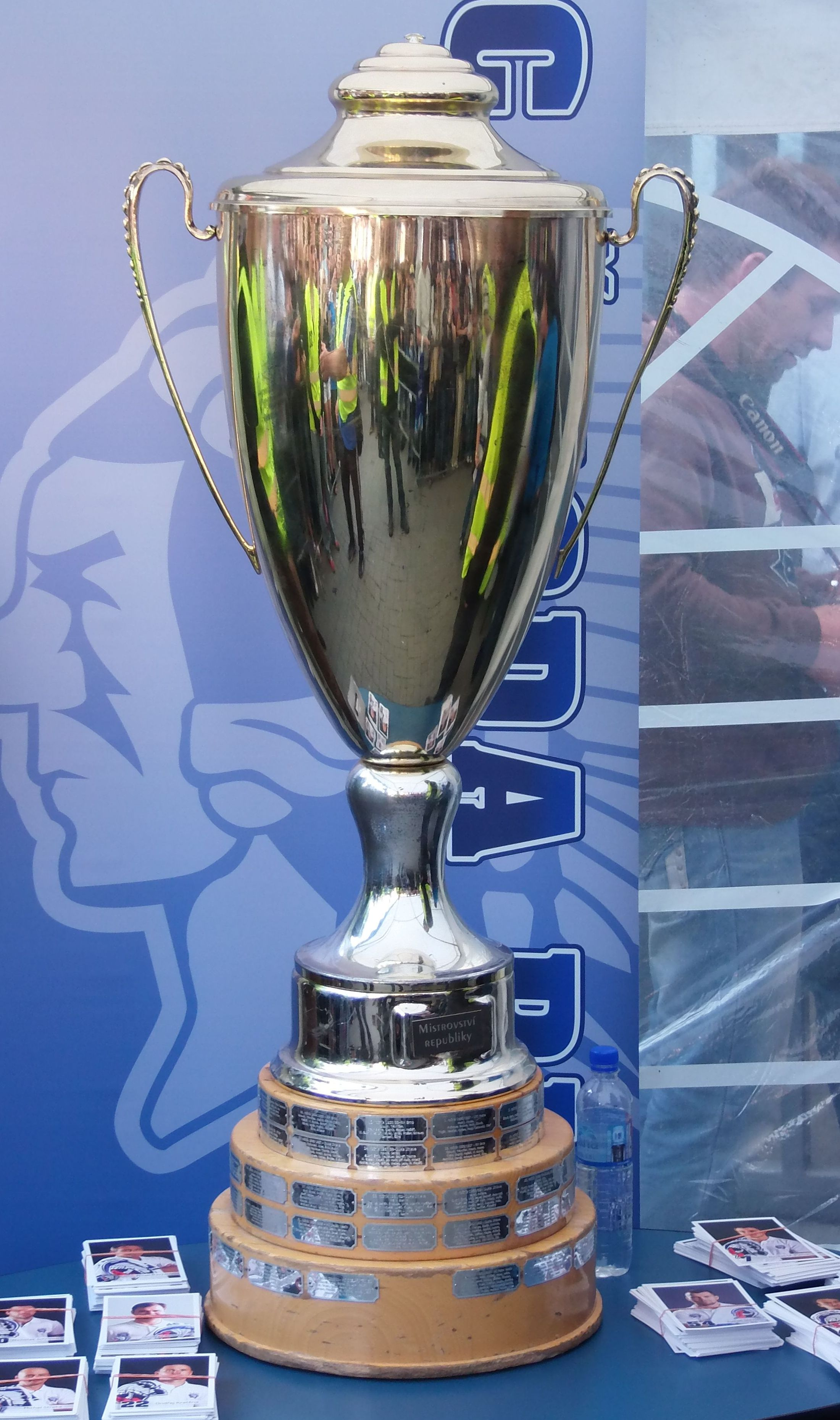 Pohár pro vítěze české extraligy ledního hokeje, foceno v Plzni po zisku titulu v sezíně 2012/13 (výřez ze souboru Pohár vítěze extraligy.jpg)